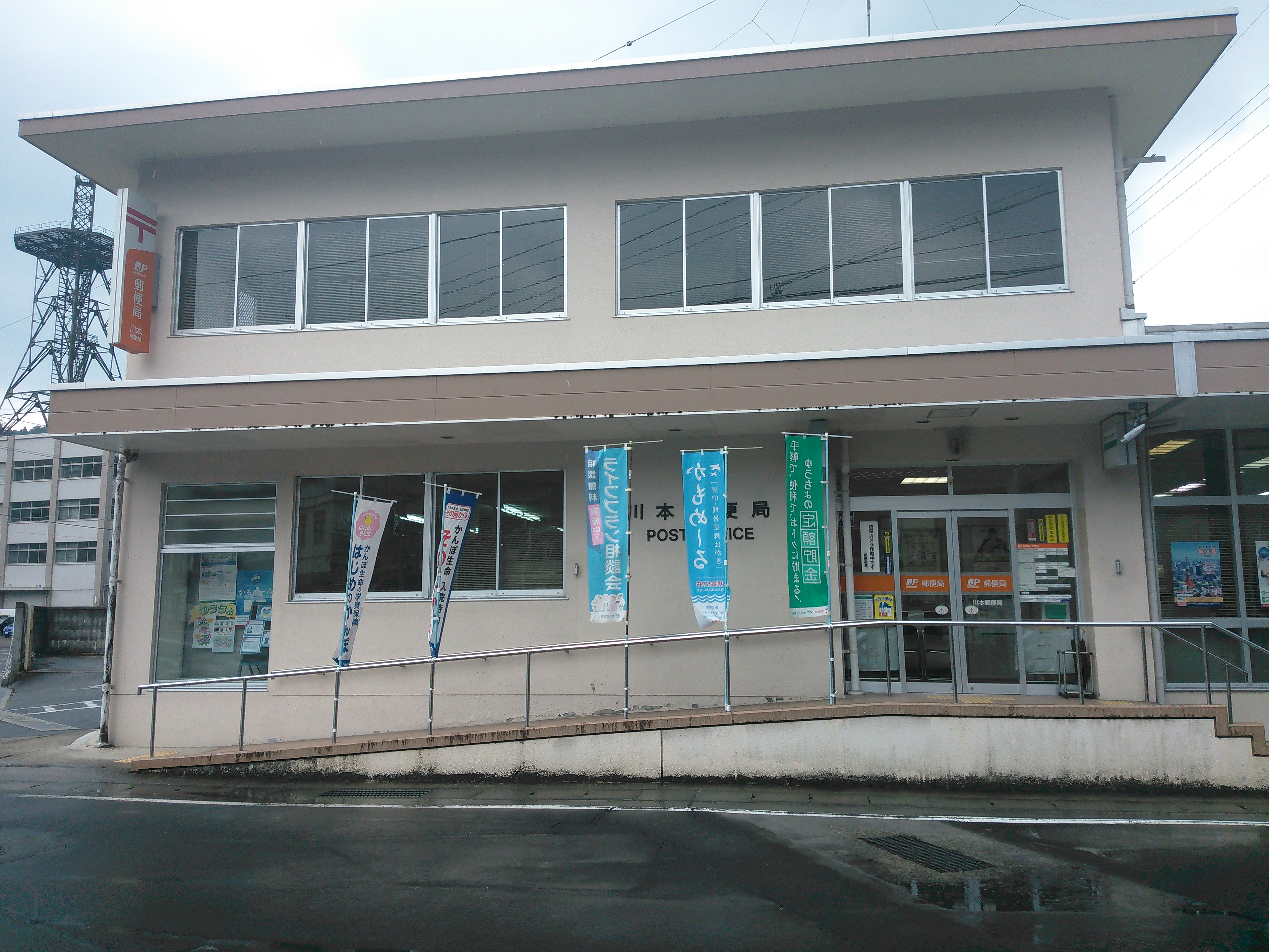 島根県邑智郡川本町、川本郵便局